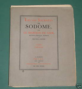 Les 120 journées de Sodome,Sade,Paris,édition de 1931: Par S&C, aux dépens des bibliophiles souscripteurs, 1931. Edition critique, établie par Maurice Heine